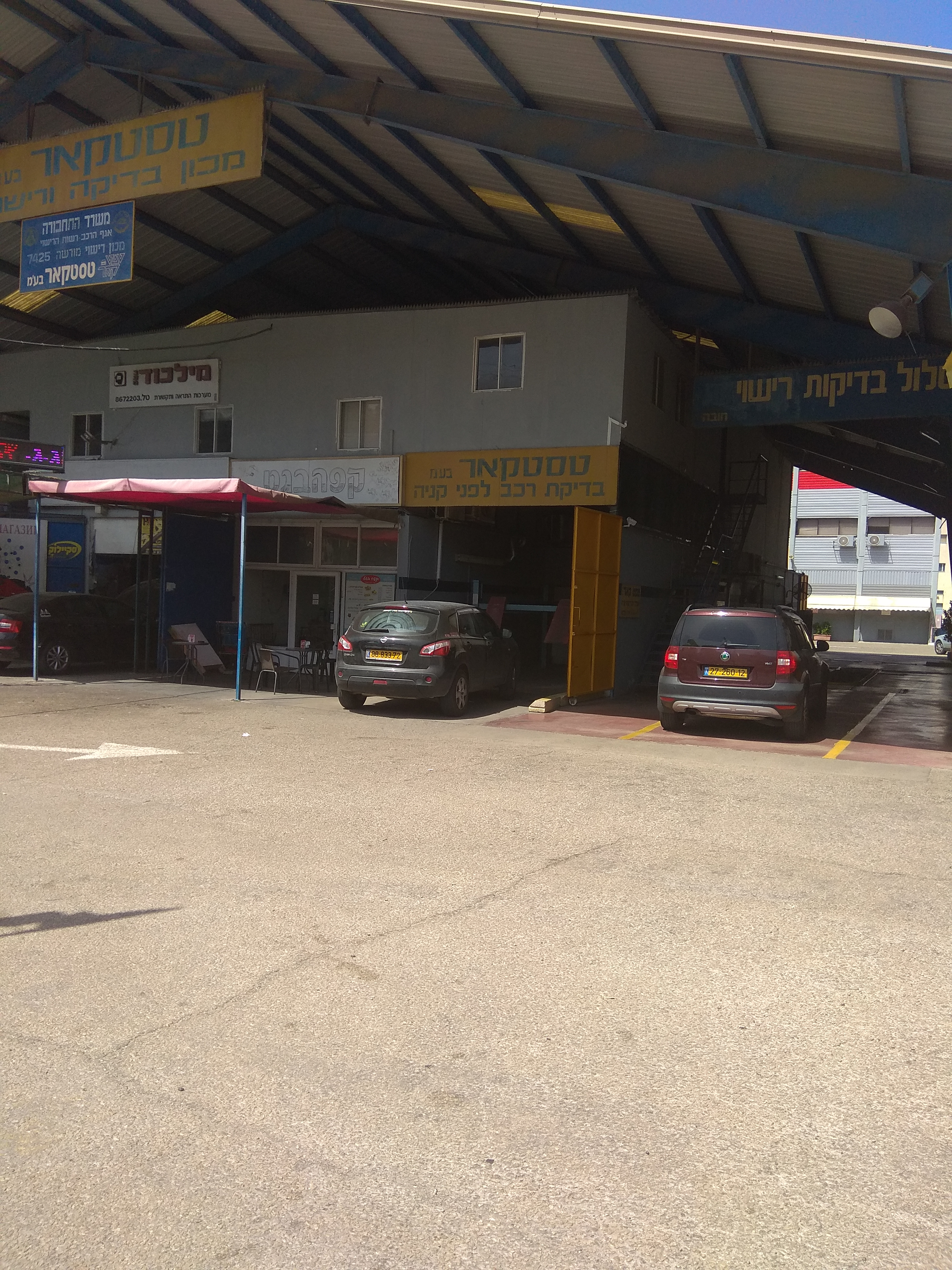 מכון רישוי לרכב בעיר נשר (עיר)